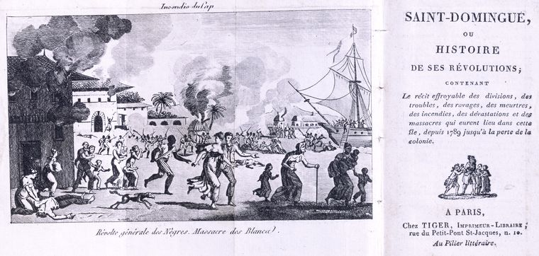 Couverture de l'ouvrage "Saint-Domingue ou l'Histoire de ses révolutions".